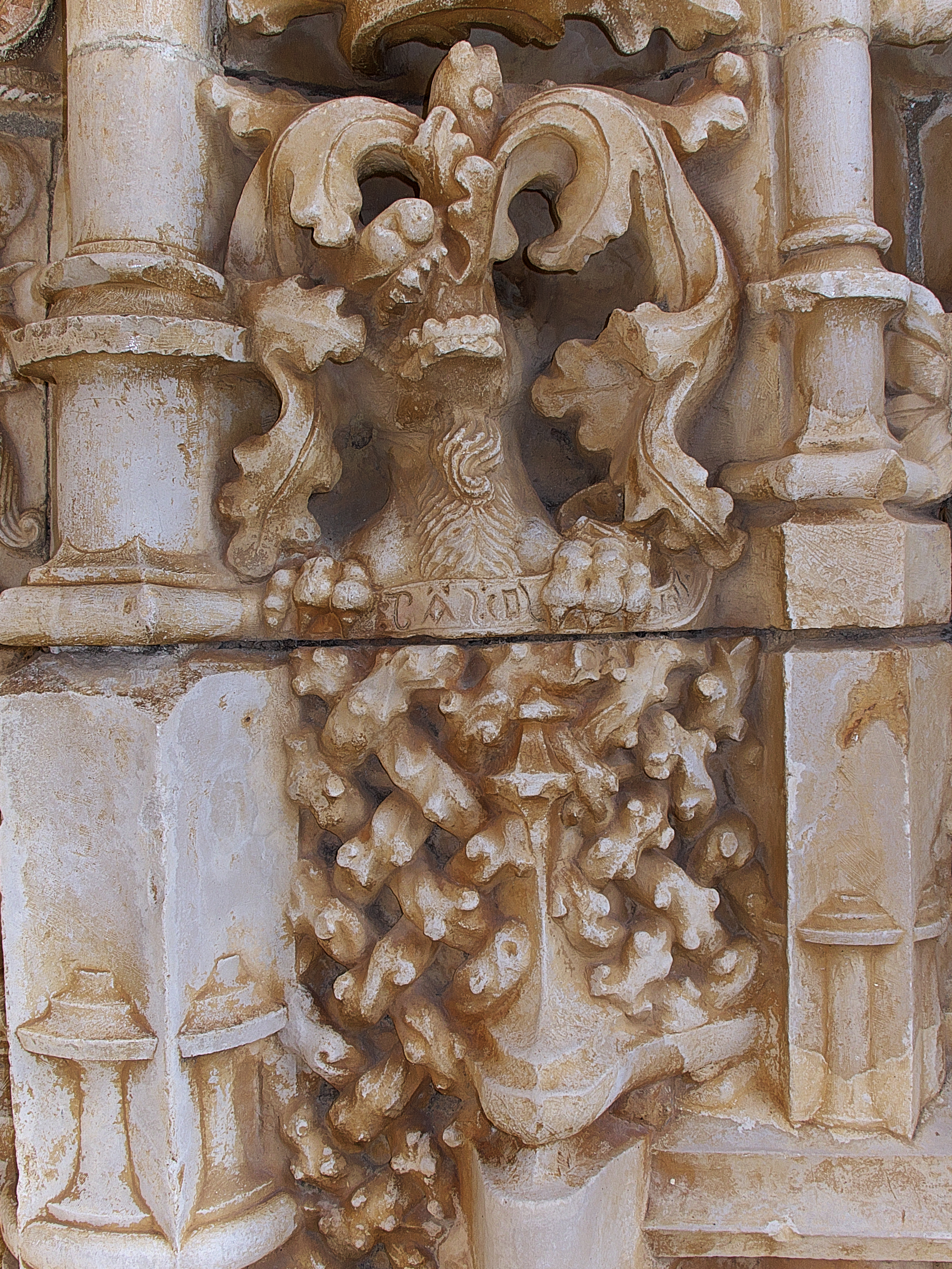 La firma del maestro en el portal de la iglesia del Convento de Cristo. Nacido en Arnuero (Cantabria) se formó con Simón de Colonia en Burgos. Con él se desplazó a la Catedral de Sevilla, siendo aparejador de Alonso Rodríguez.